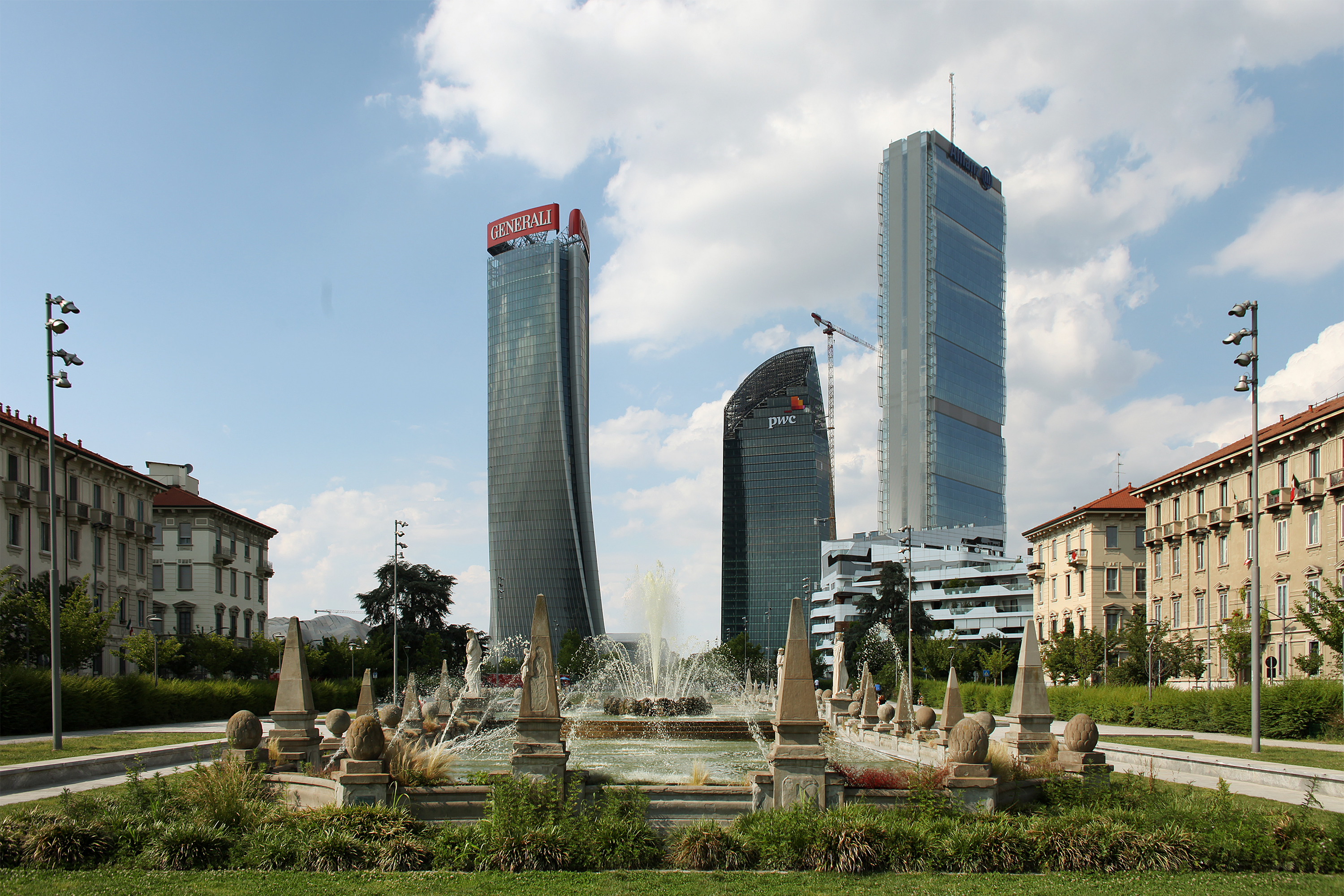 Torri e fontana delle quattro stagioni viste dal piazzale Giulio Cesare a Milano